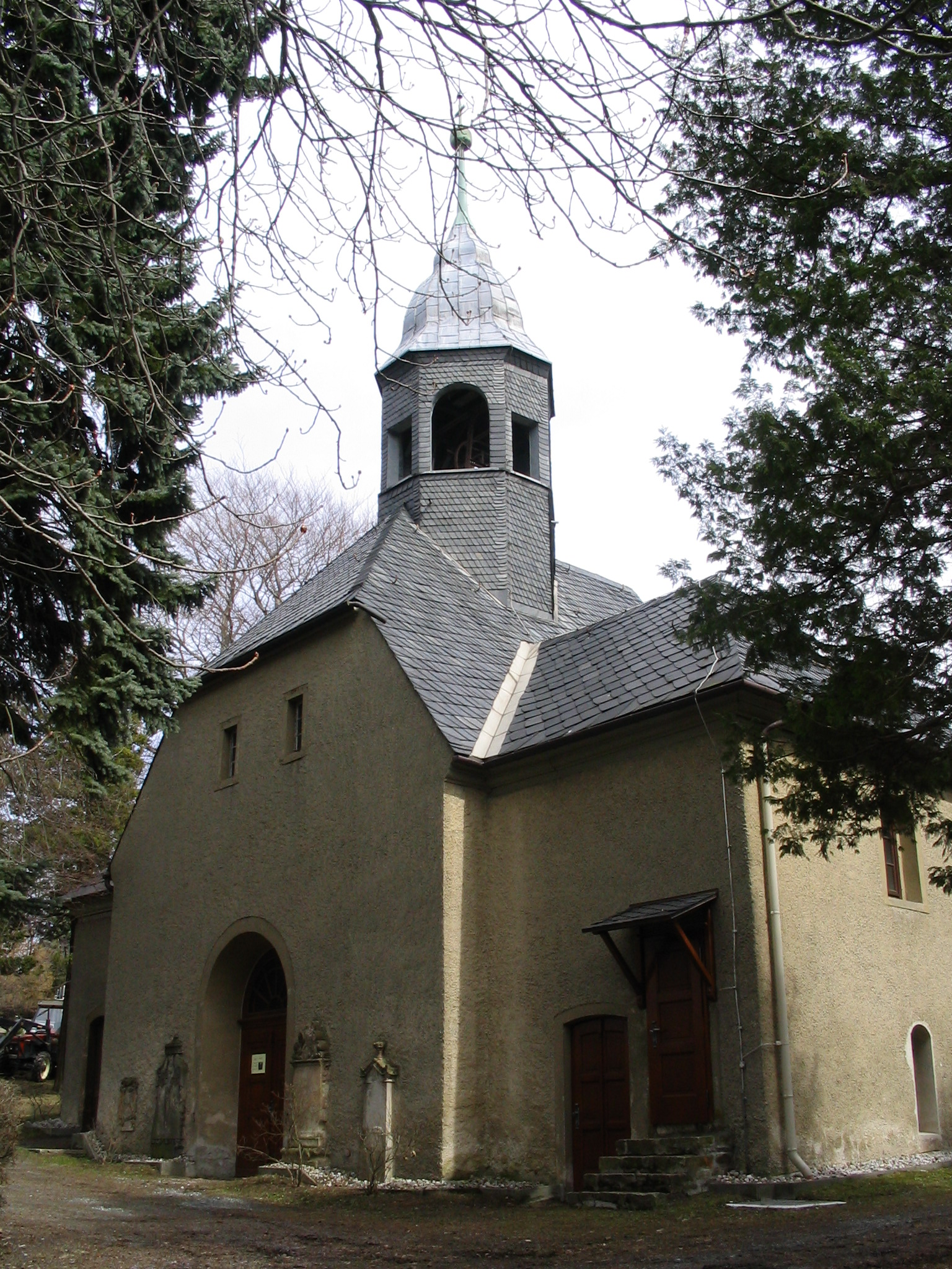 Alte Kirche, heutige Friedhofskapelle, aufgenommen am 15.04.2006 von Dr. Hagen Graebner